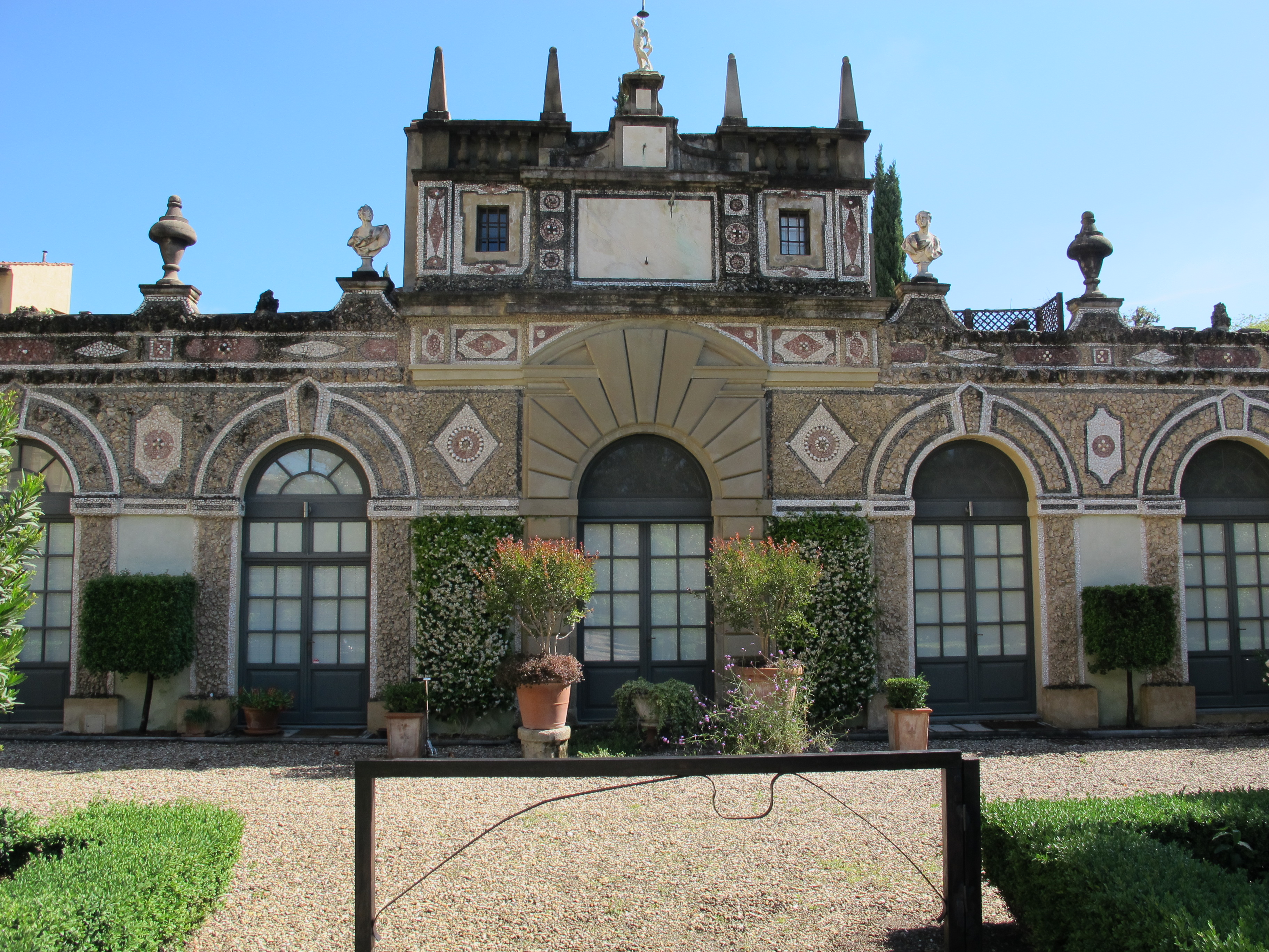 Palazzo di gino capponi, limonaia